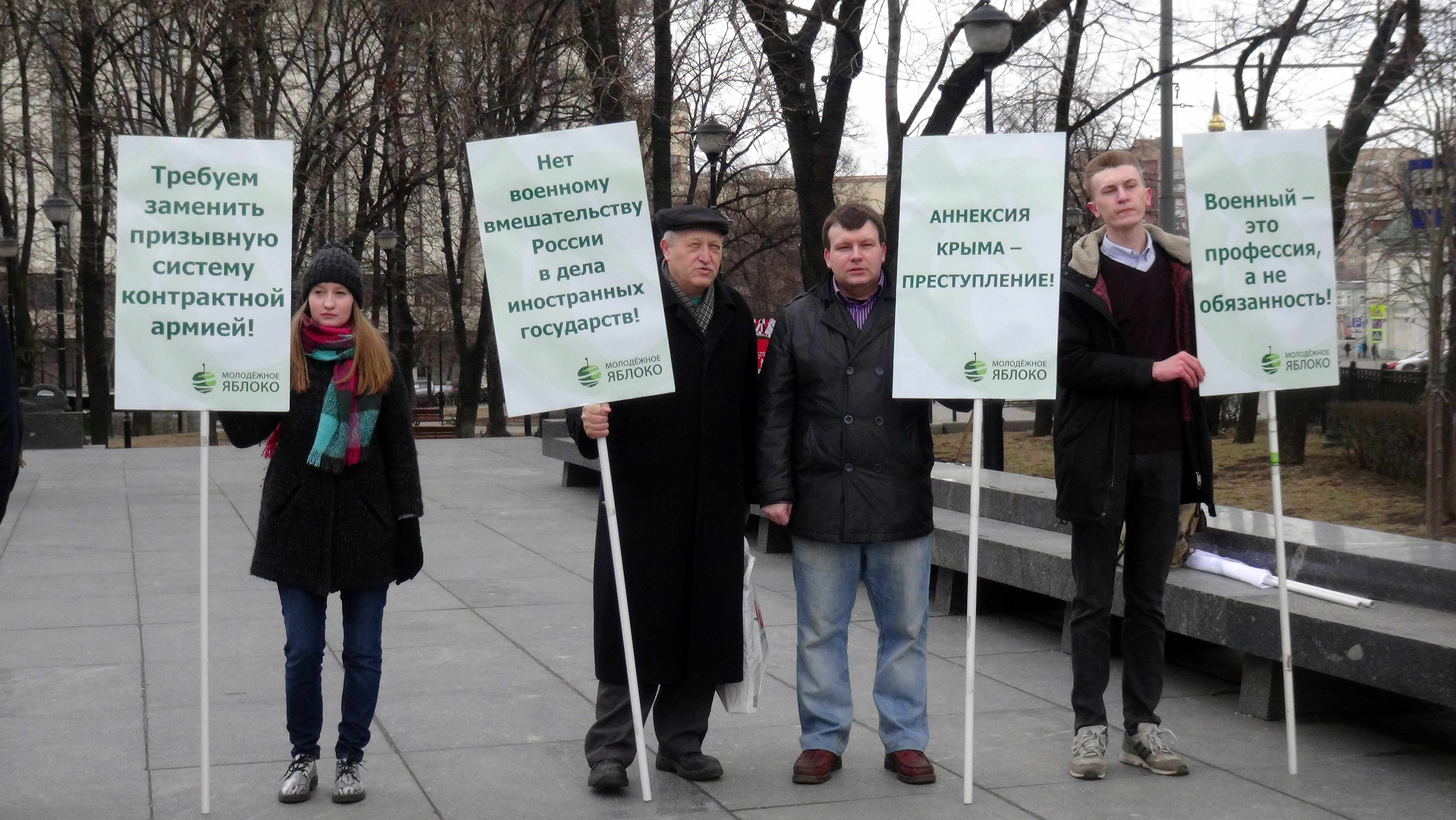 Активисты "Молодежного ЯБЛОКА" на антивоенной акции в Москве. 3 апреля 2016 года.